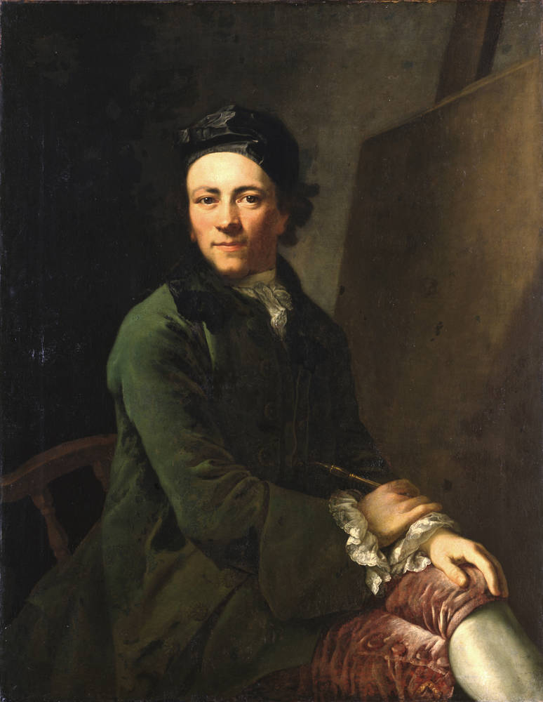 Dieses Gemälde liess Anton Graff durch seinen Freund, den Zürcher Hauptmann und Verleger Johann Heinrich Heidegger, 1765 an Christian Ludwig von Hagedorn nach Dresden schicken. So wurde dieses Bild das Aufnahmestück von Anton Graff für die Dresdner Kunstakademie. Das Porträt wurde auf der Ausstellung der Dresdner Kunstakademie 1766 ausgestellt.